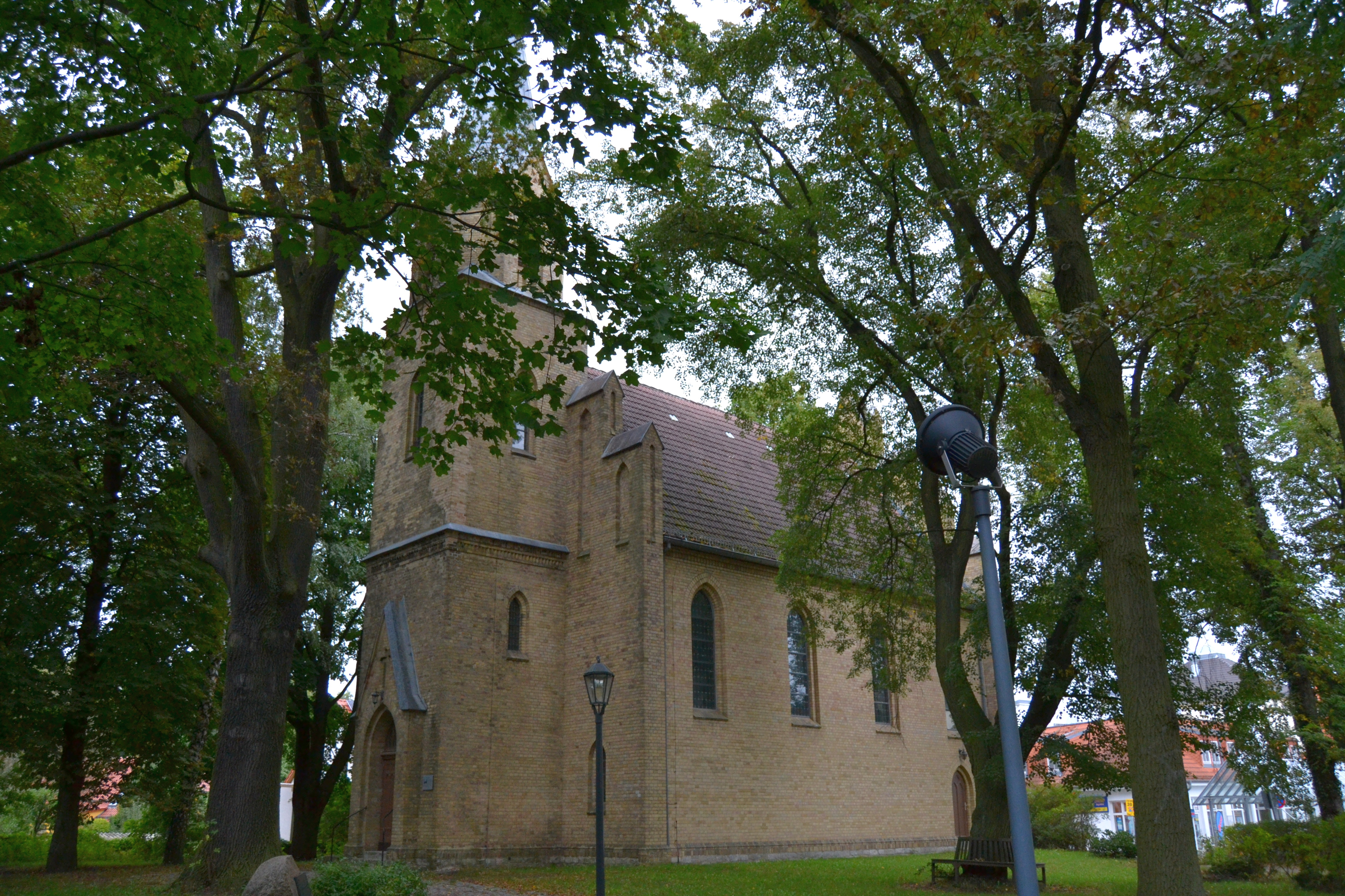 Dorfkirche Eggersdorf. Die evangelische Kirche stammt aus dem Spätmittelalter. Sie wurde später barock umgebaut. Der Turm stammt aus der ersten Hälfte des 19. Jahrhundert. Im Inneren steht ein Kanzelaltar aus dem Jahre 1746.